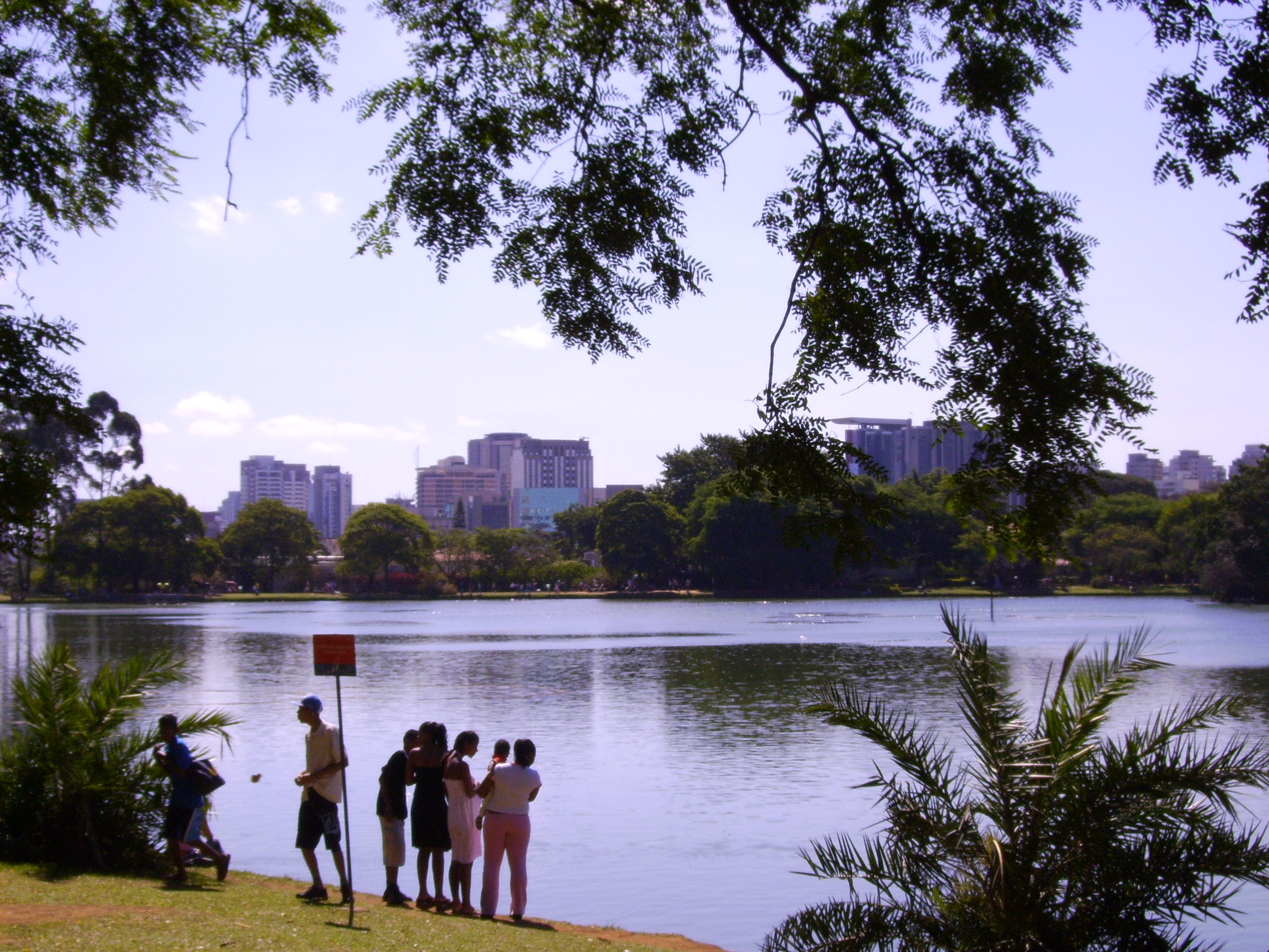 lake in the Parque do Ibirapuera in Sao Paulo, Brazil